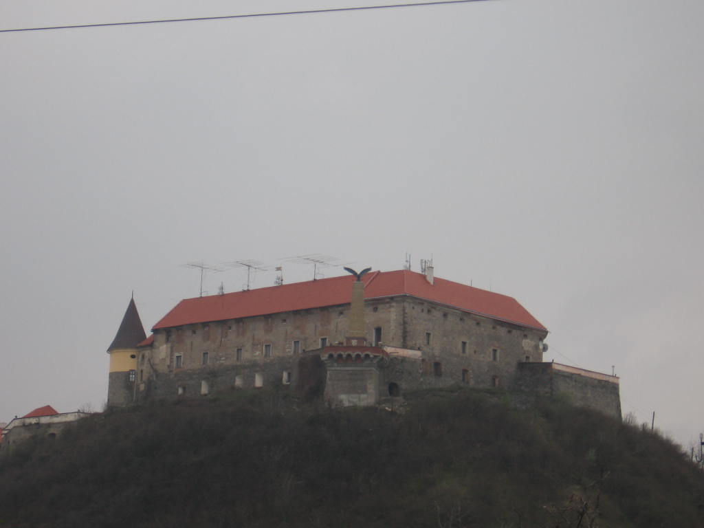 A munkácsi vár a turul szoborral